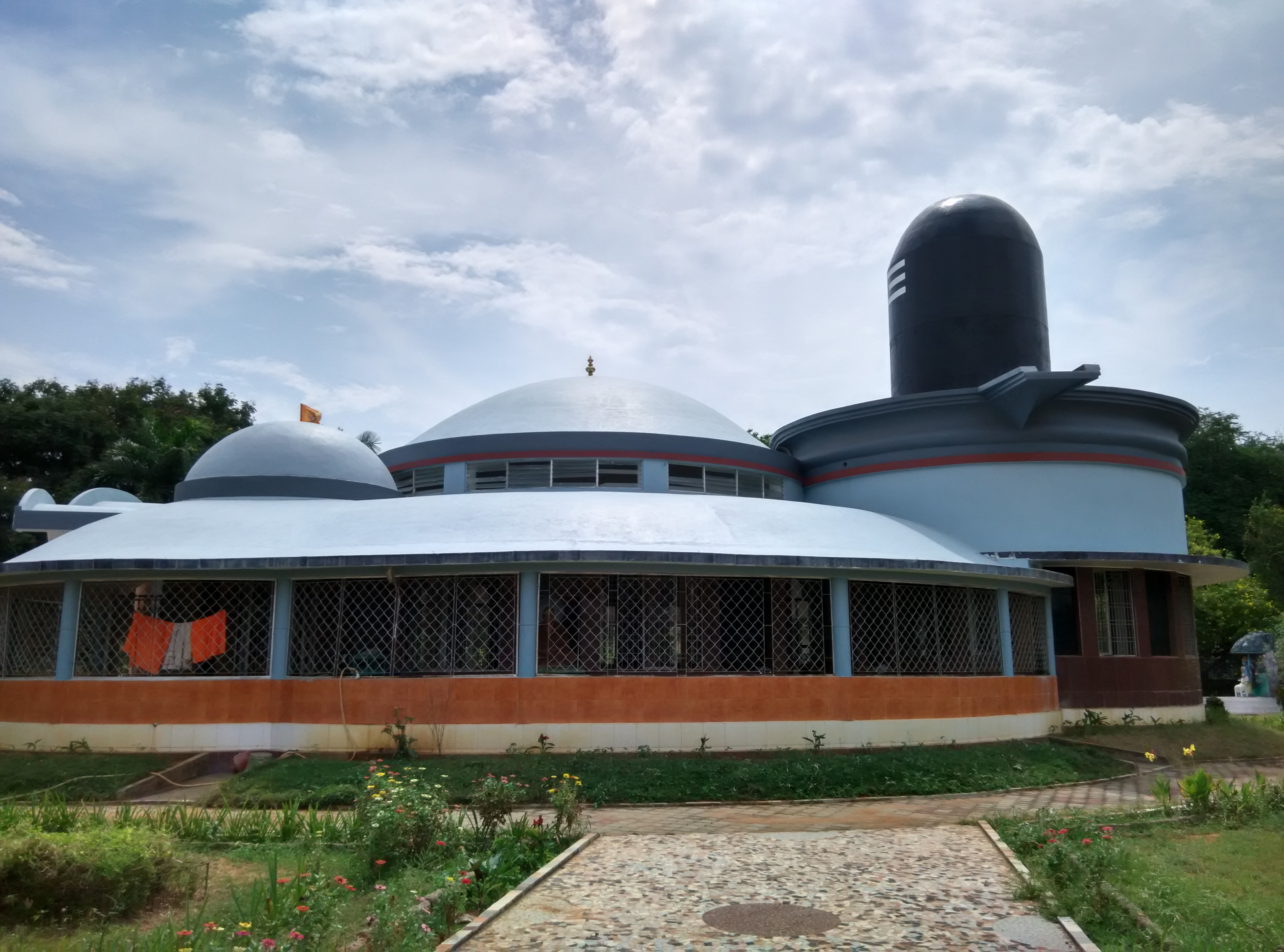 Memorial of Sri vidya prakasananda at Srikalahasti, Andhra pradesh, India